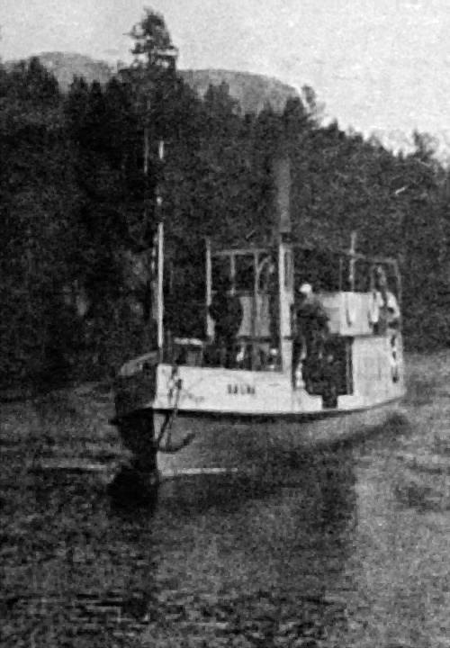 DS «Bægna»